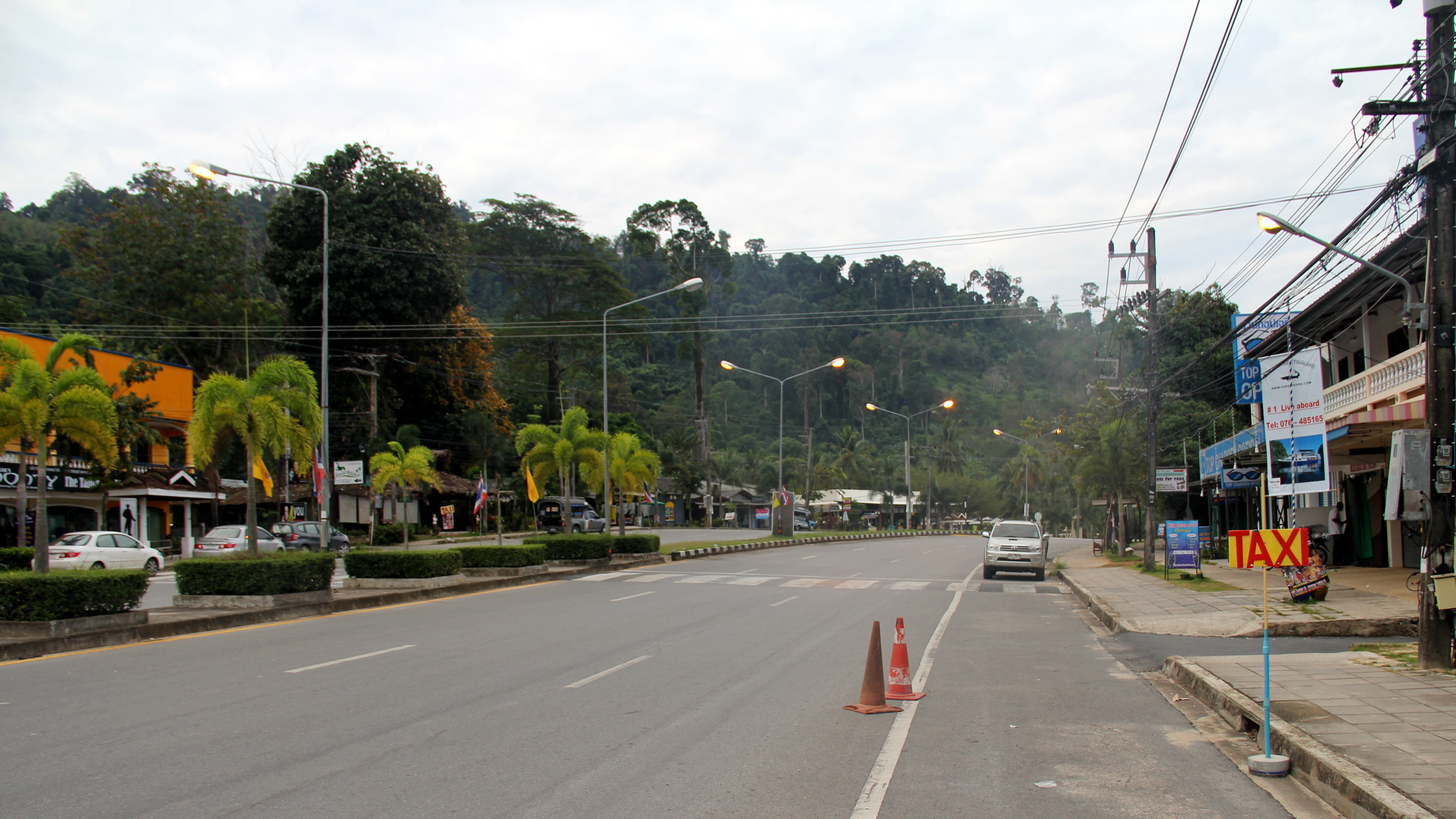 Khao Lak Kasabası